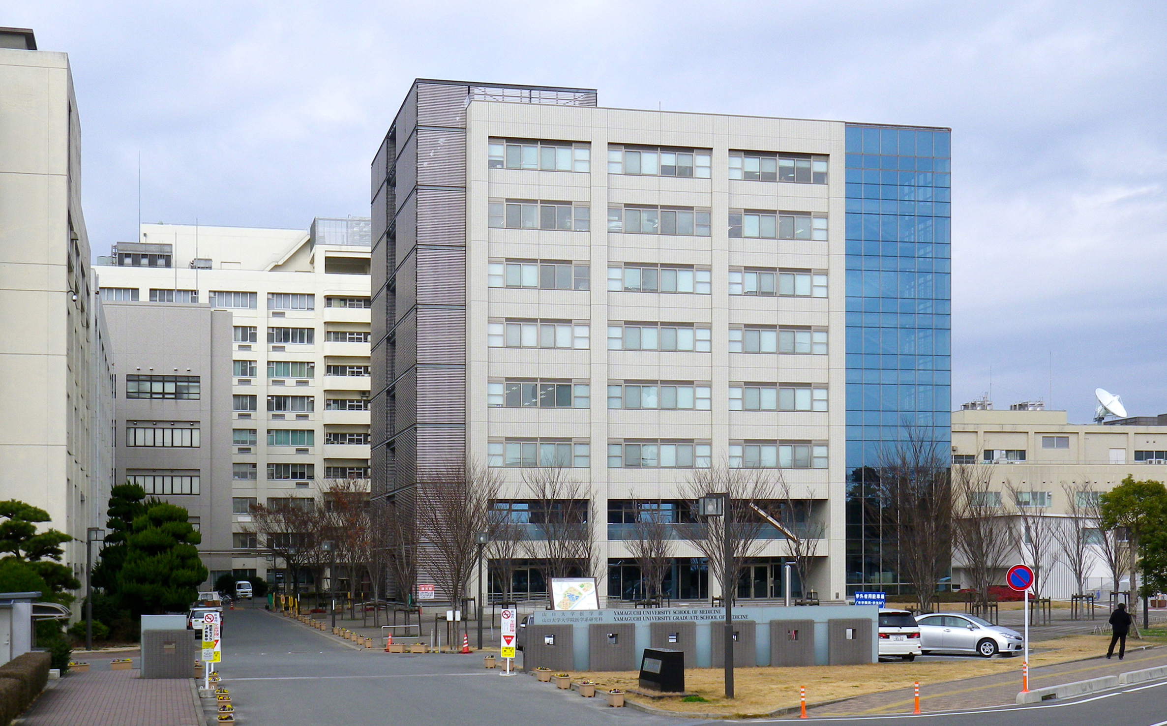 山口県宇部市。山口大学医学部総合研究棟と同大学小串キャンパス正門。